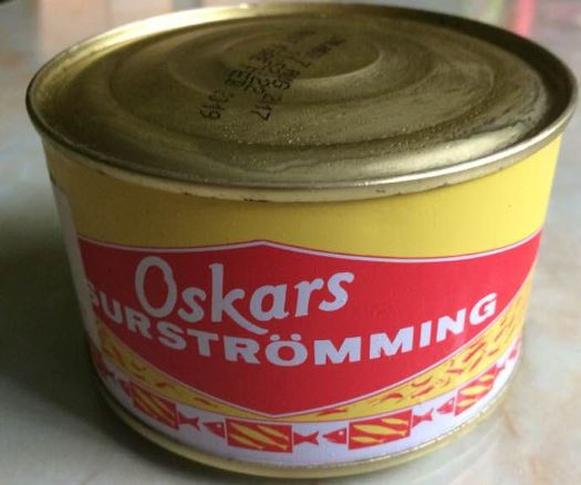 Zaprta pločevinka Suströmming-a